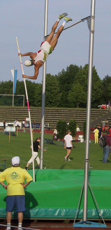 Stabhochspringer beim Aufrollen